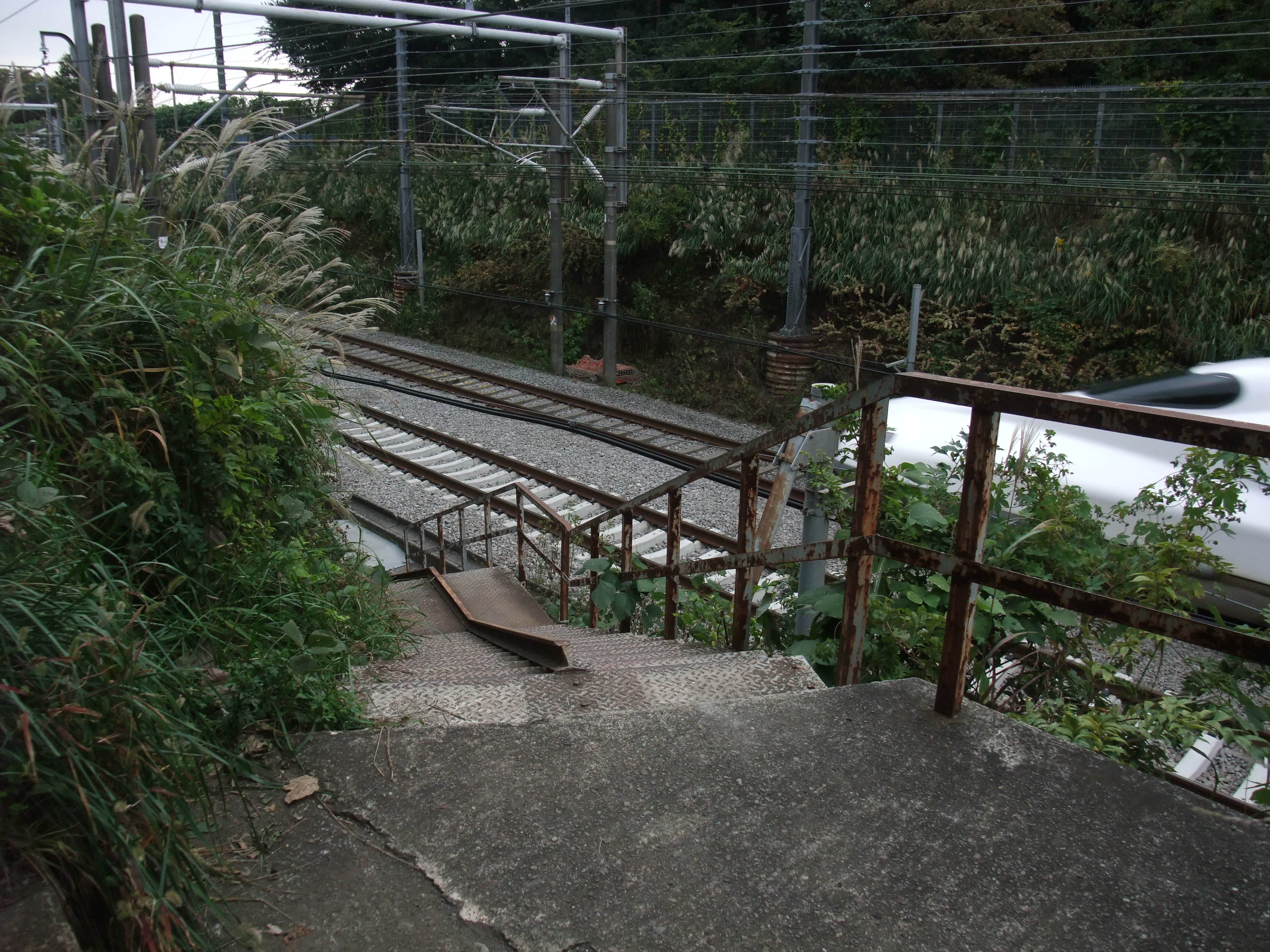 東海道新幹線切土区間の八軒町作業用昇降階段（藤沢市長後）。モデル線における綾瀬側の出入り口として使われた。